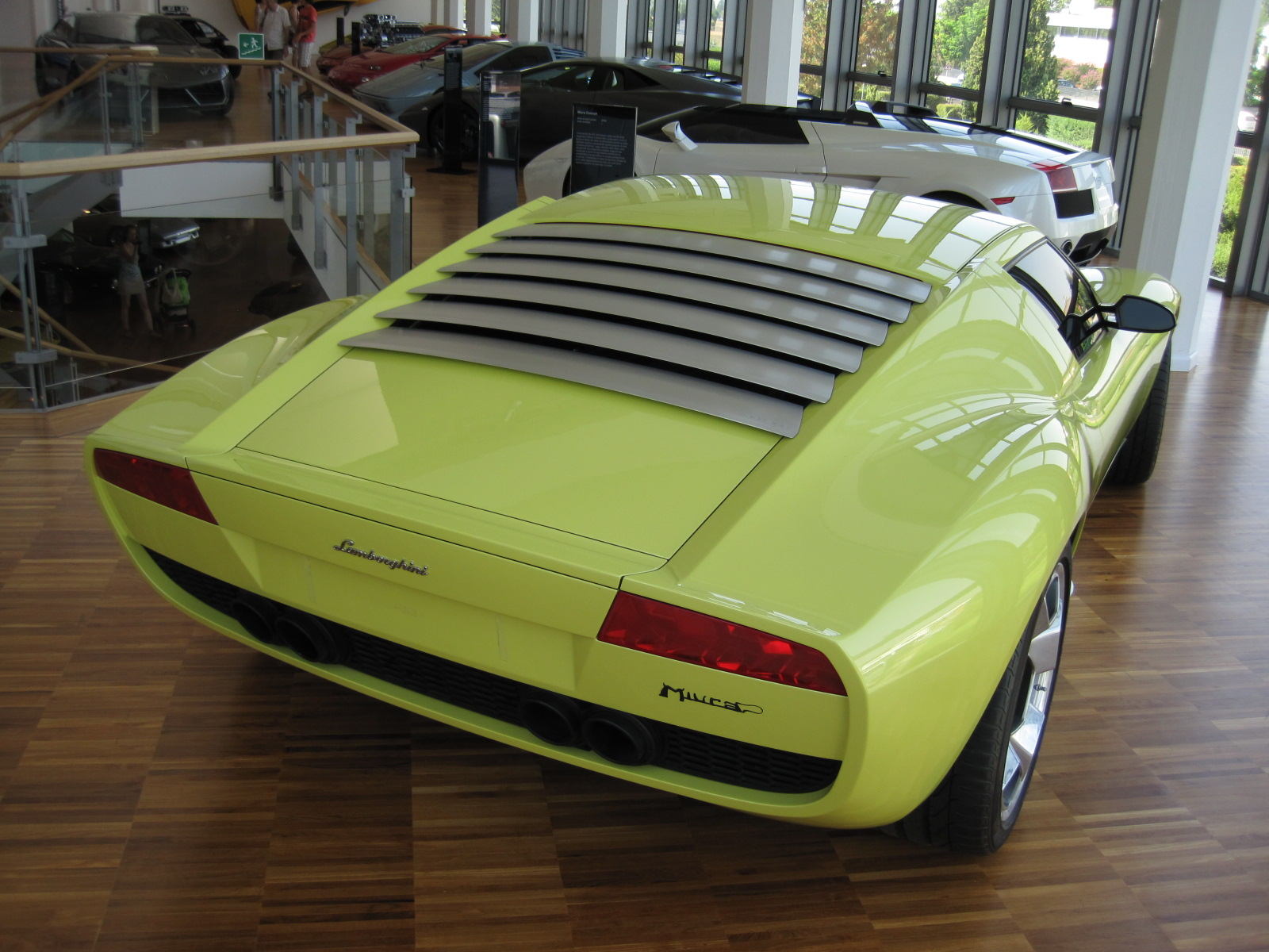 Musée Lamborghini - Miura Concept car 2006